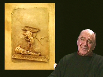 Portrait de Louis Pons